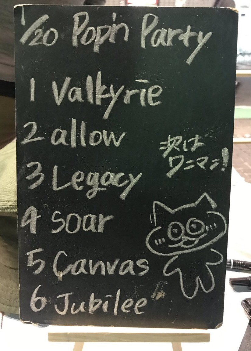 amiinAセトリボード(20190120(1))